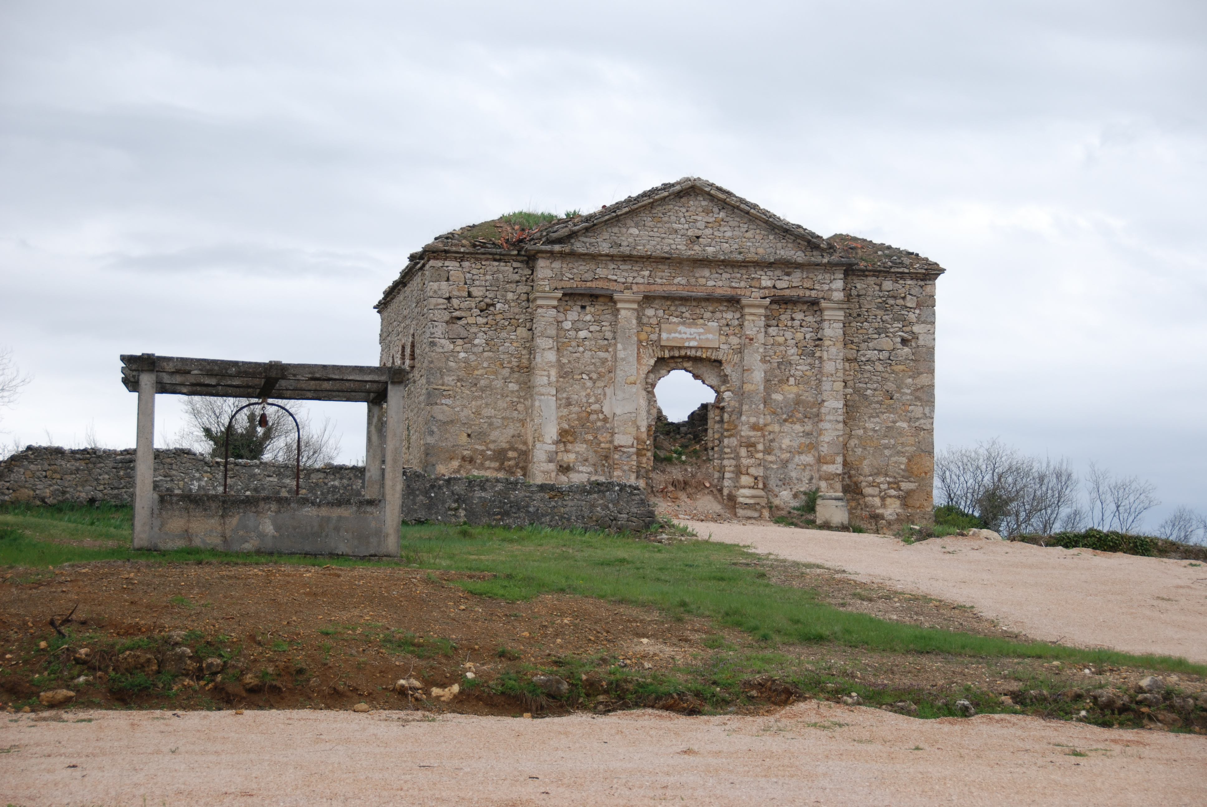 Grkokatolička crkva Pokrova Presvete Bogorodice u Kričkama kod Drniša.